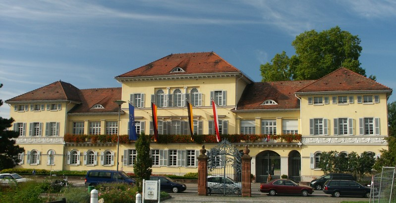 Palace in Neckarhausen